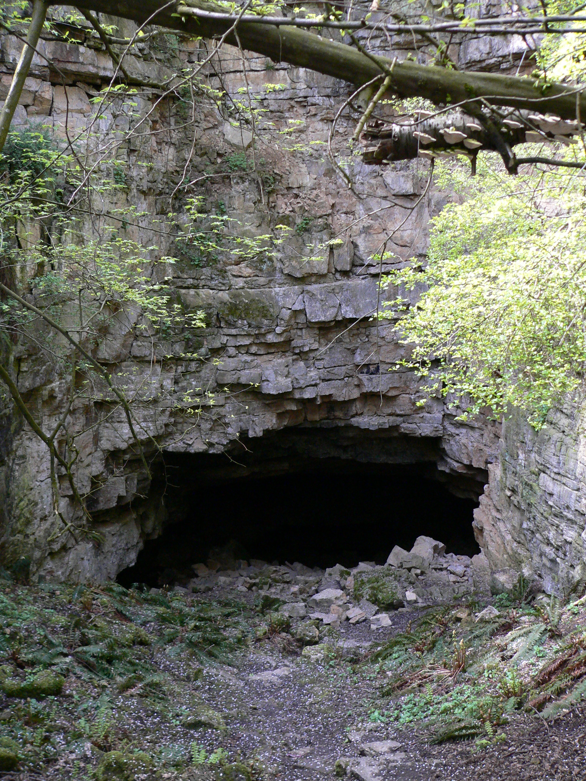 Sinkhole/cave "Altes Eisinger Loch" near Neulingen, Germany